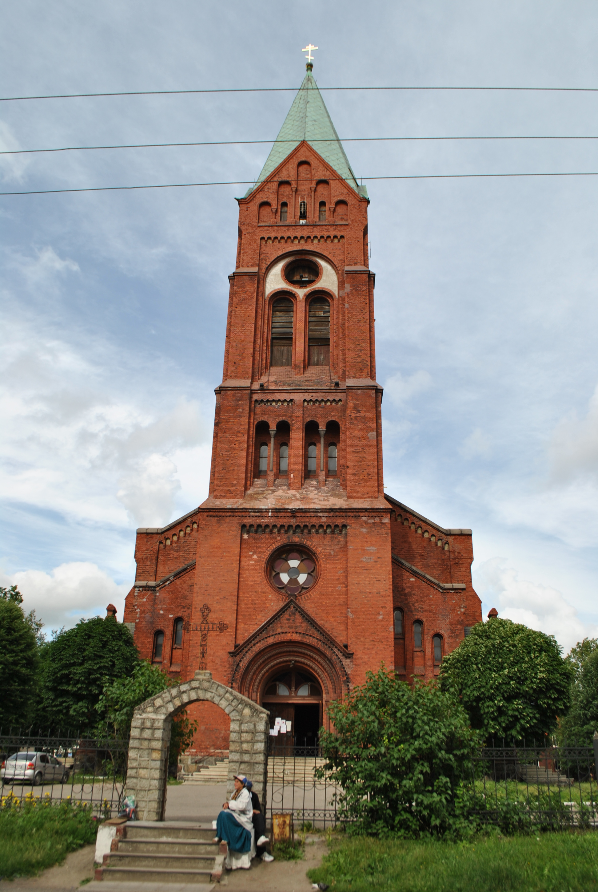 (Калиниградская область, Черняховск, пионерская улица)